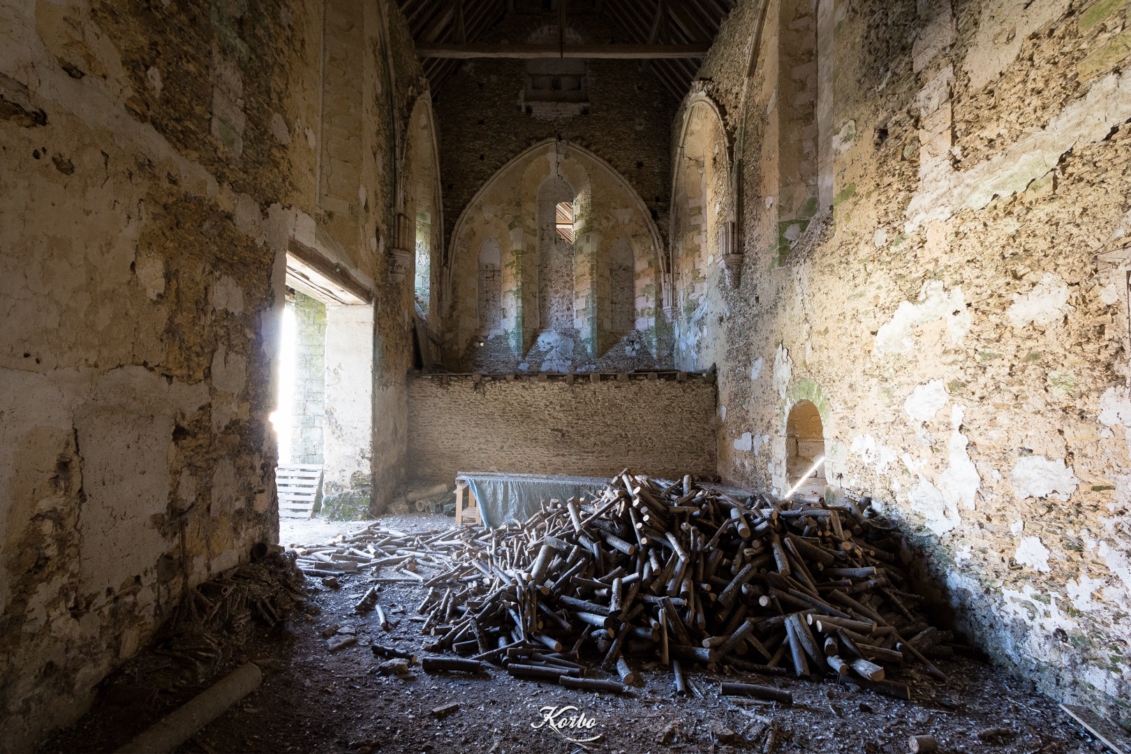 Chapelle Templière 13eme Siècle